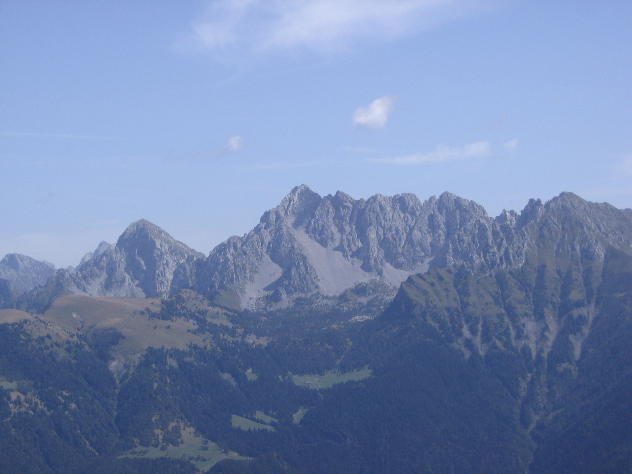 Pizzo Camino and Monte Sossino, Orobie, Italy